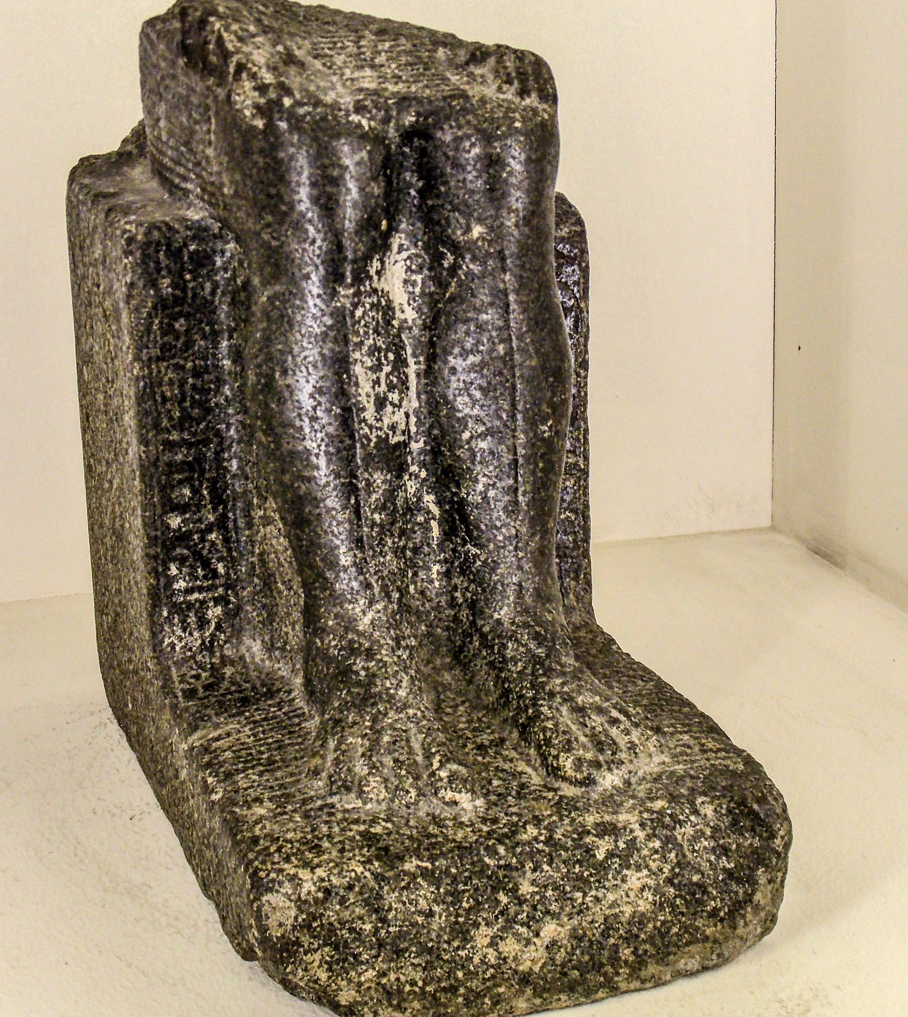 Un reperto del tempio di Iside di Benevento conservato nella sezione egizia del Museo del Sannio, presso il museo ARCOS. Statua del Medio Regno del faraone Merishepsesra.